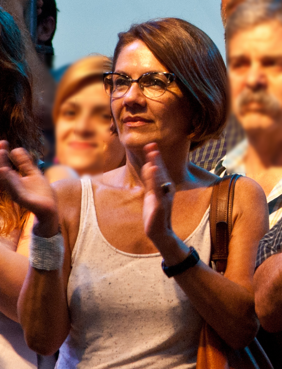 Sandra Russo en Buenos Aires (Argentina), en octubre de 2012. Detrás, a la derecha, se puede ver a Sergio Burstein.